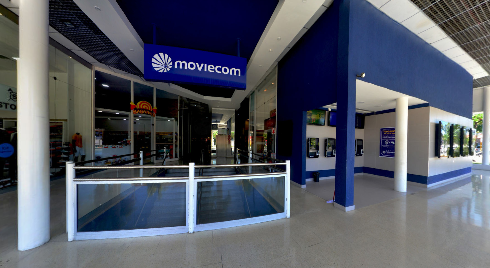 Entrada do Moviecom Praia Shopping e totens de autoatendimento